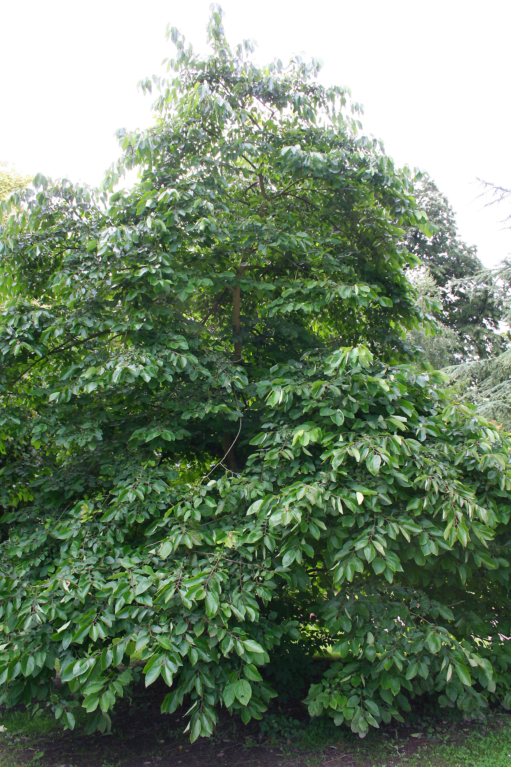 Plaqueminier de Virginie (Diospyros virginiana) - Habitat: Morlanwelz-Mariemont (Belgique) - Parc de Mariemont.